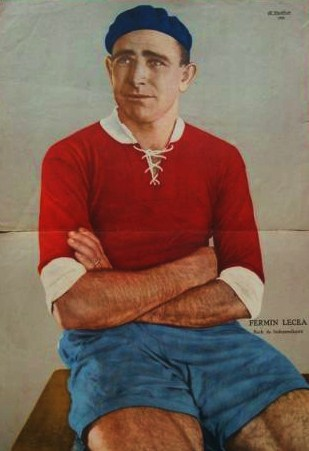 jugador de fútbol